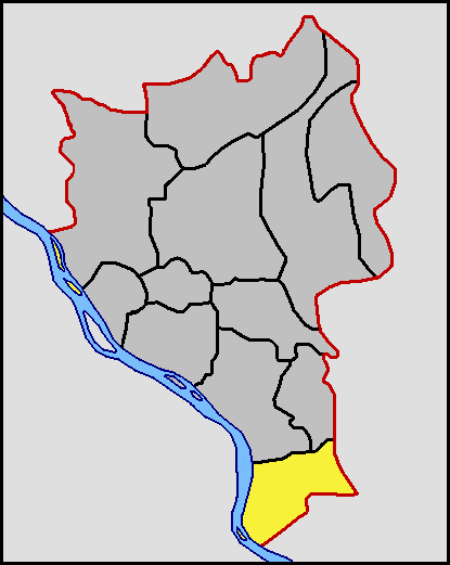 خريطة محلة دياي، دسوق